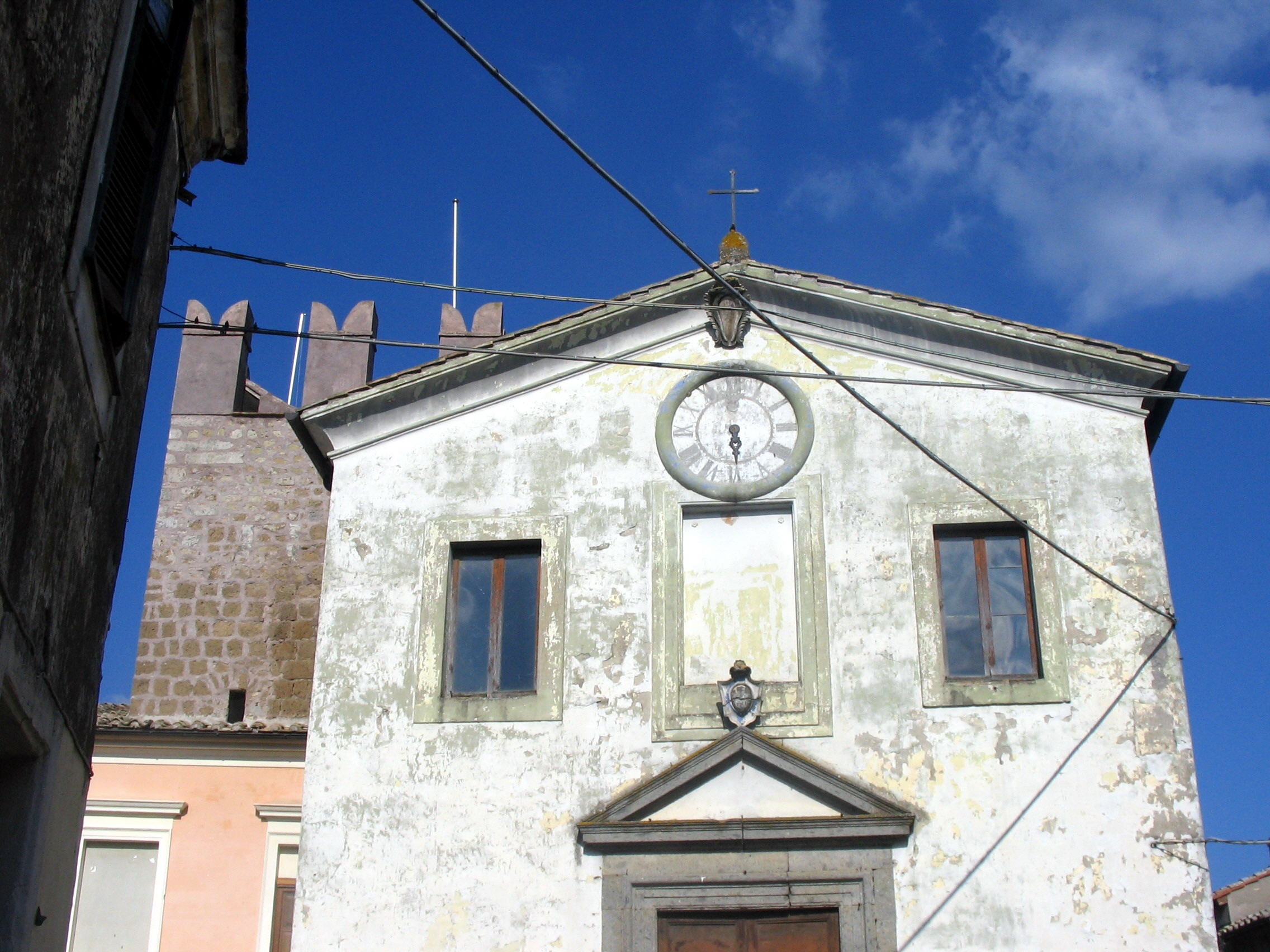 Calcata, Lazio, Italia